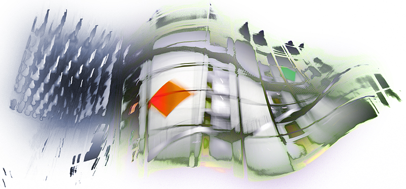 Paul-Löbe-Haus Berlin, surrealistische Bildbearbeitung von Joachim Wasserthal